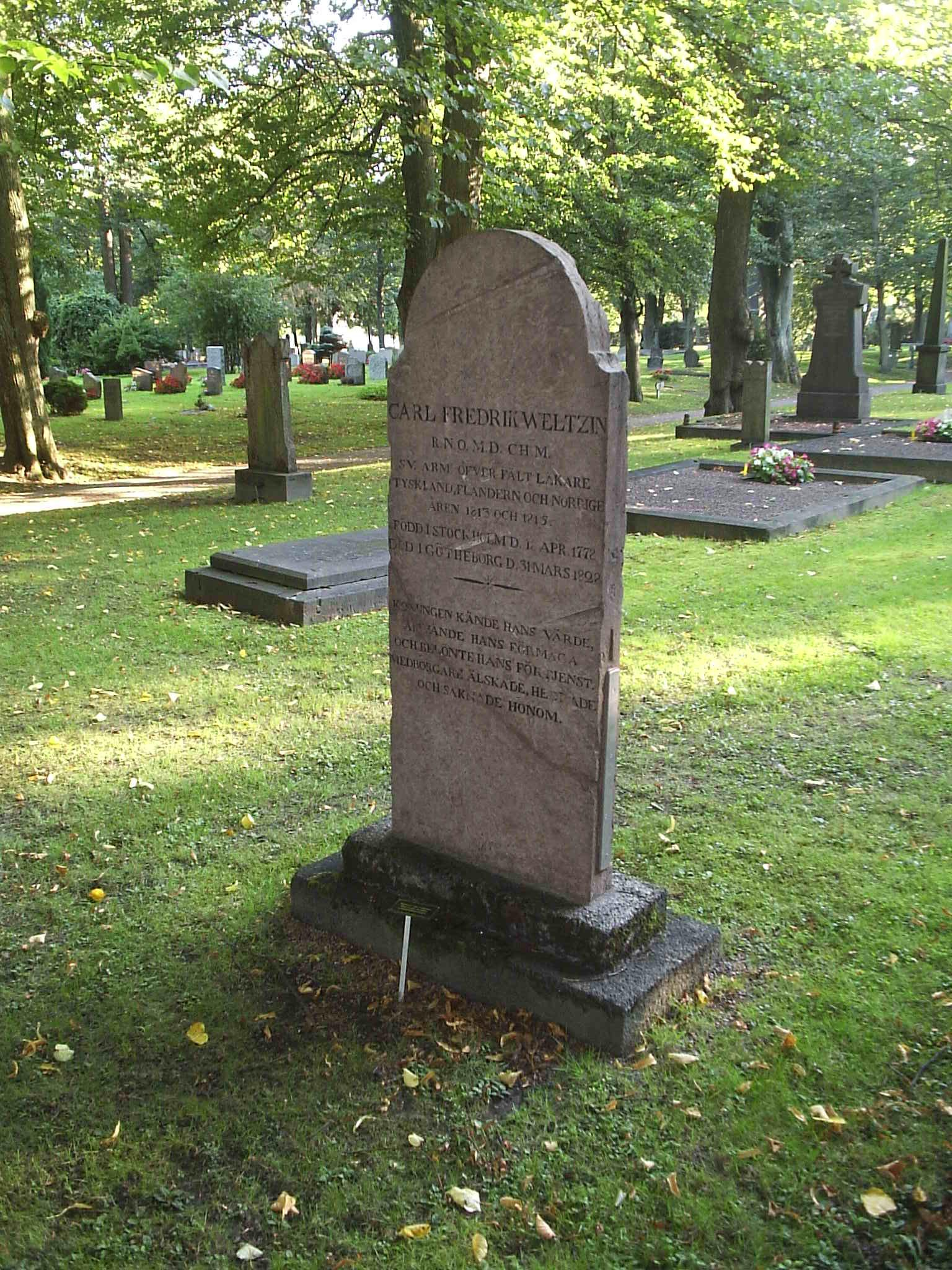 Bilden är fotograferad av Harri Blomberg. Photo by Harri Blomberg.